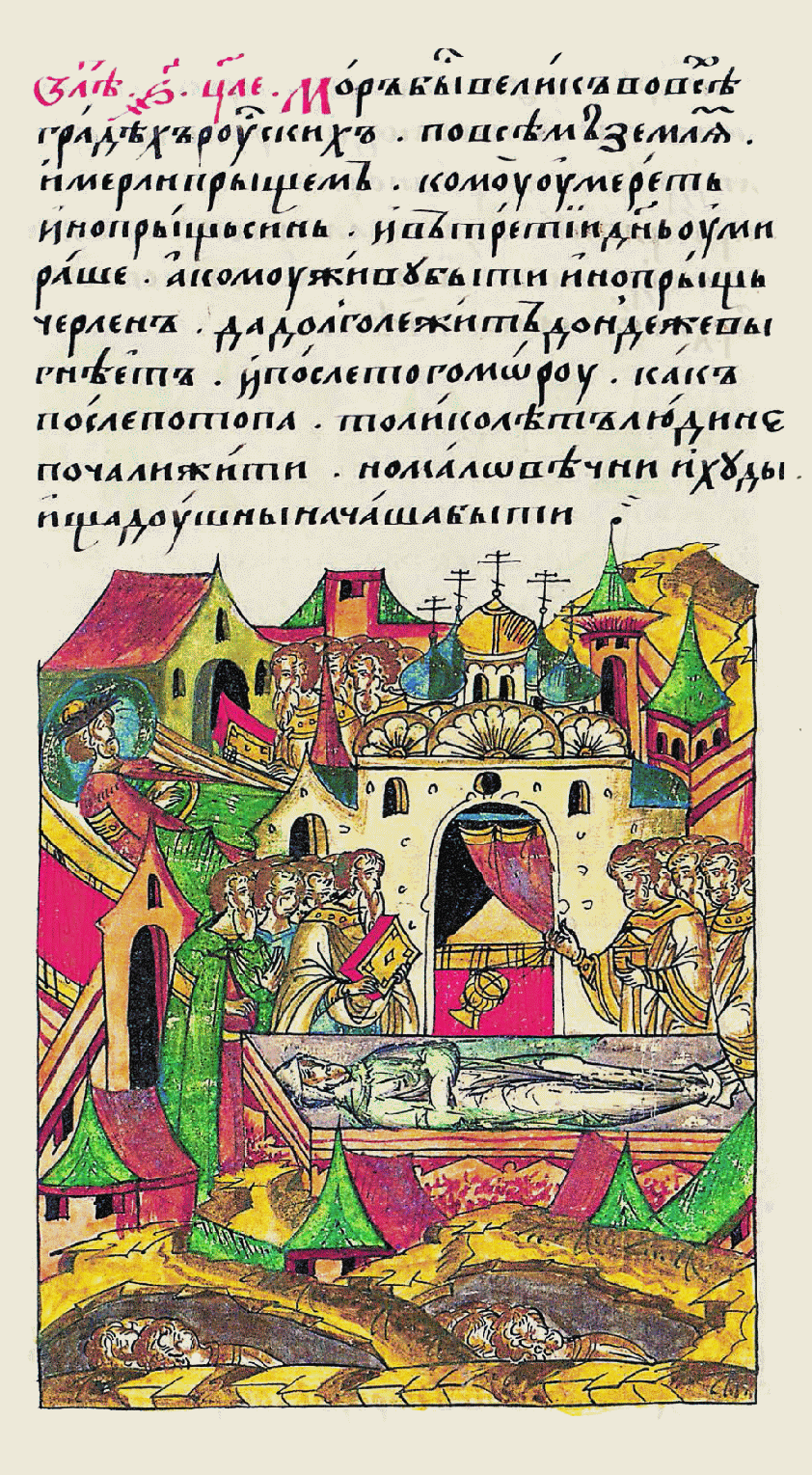 В том же году во время того же мора скончался князь Василий Влади- мирович, внук Андре- ев, правнук Иванов, праправнук Дании- ла Александровича Московского, и поло- жен он был в церкви архангела Михаила в Москве.